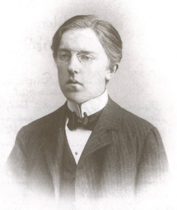 Jiří Červený (1887 - 1962), Český kabaretiér, humorista, spisovatel a hudební skladatel.